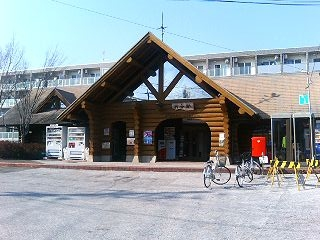 Shikoku Railway Asakura Station 四国旅客鉄道 朝倉駅 駅舎